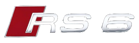 Audi RS6 logo